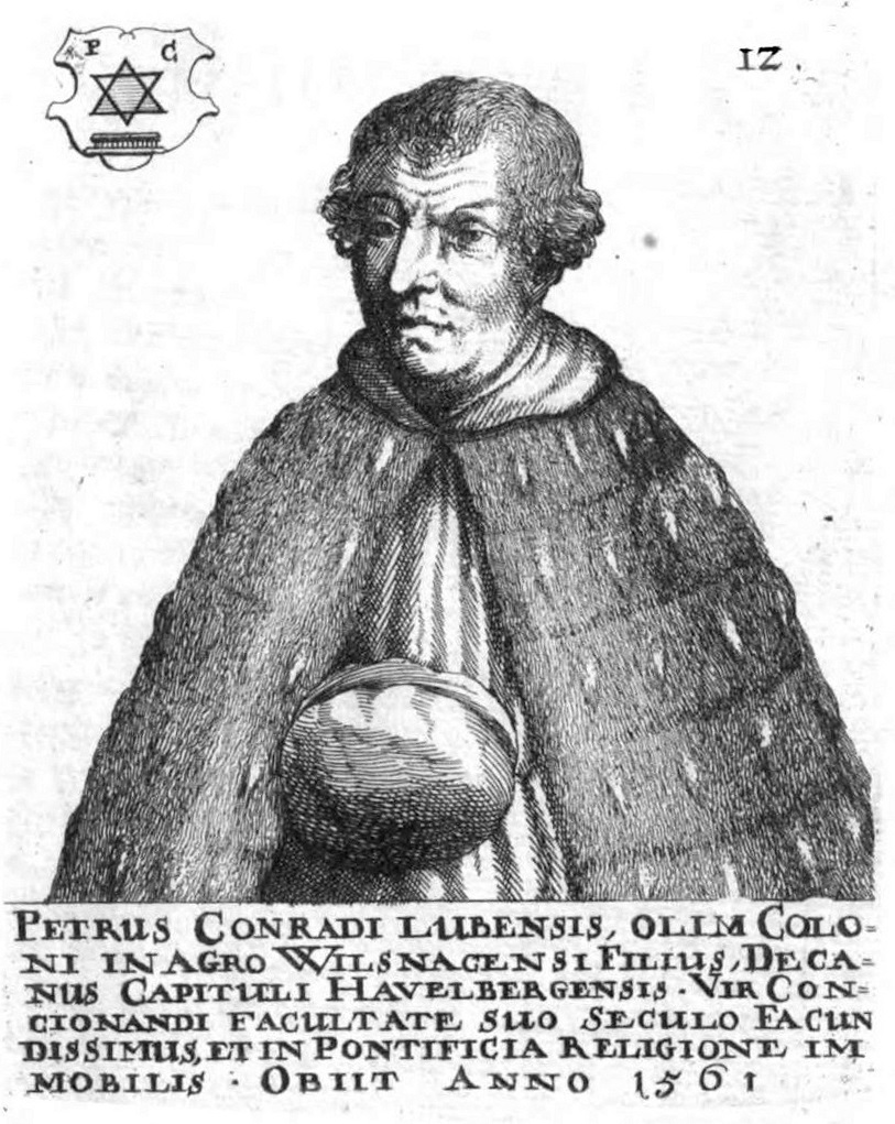 Petrus Conradi, zeitgenössischer Stich